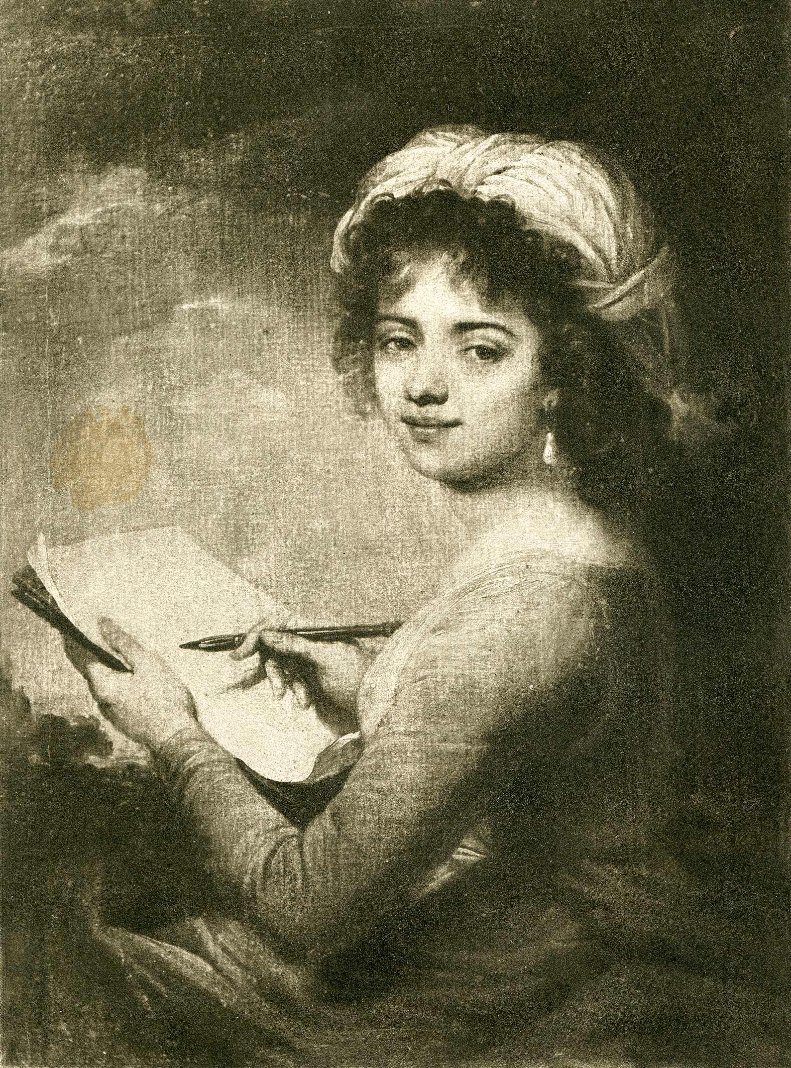 Portrait d'Anna Tyszkiewtcz, comtesse Potocka, par Angelica Kauffmann